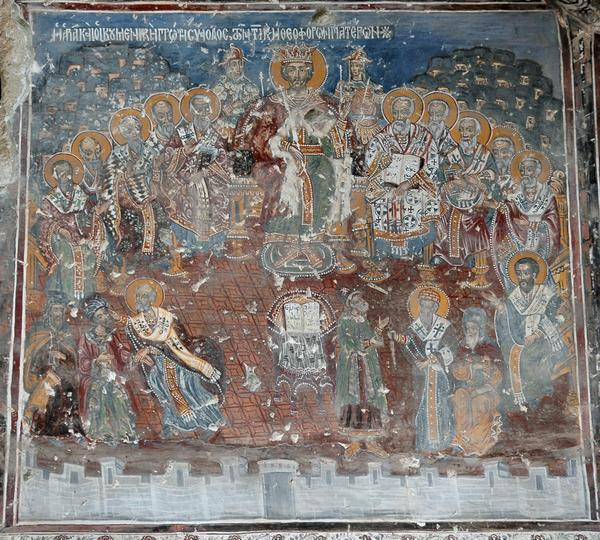 Het concilie van Nicea, afgebeeld in het Sumelaklooster nabij Trabzon, TurkijeUnknownUnknown the council of nicea, picture from sumela monastery near trabzon, turkey